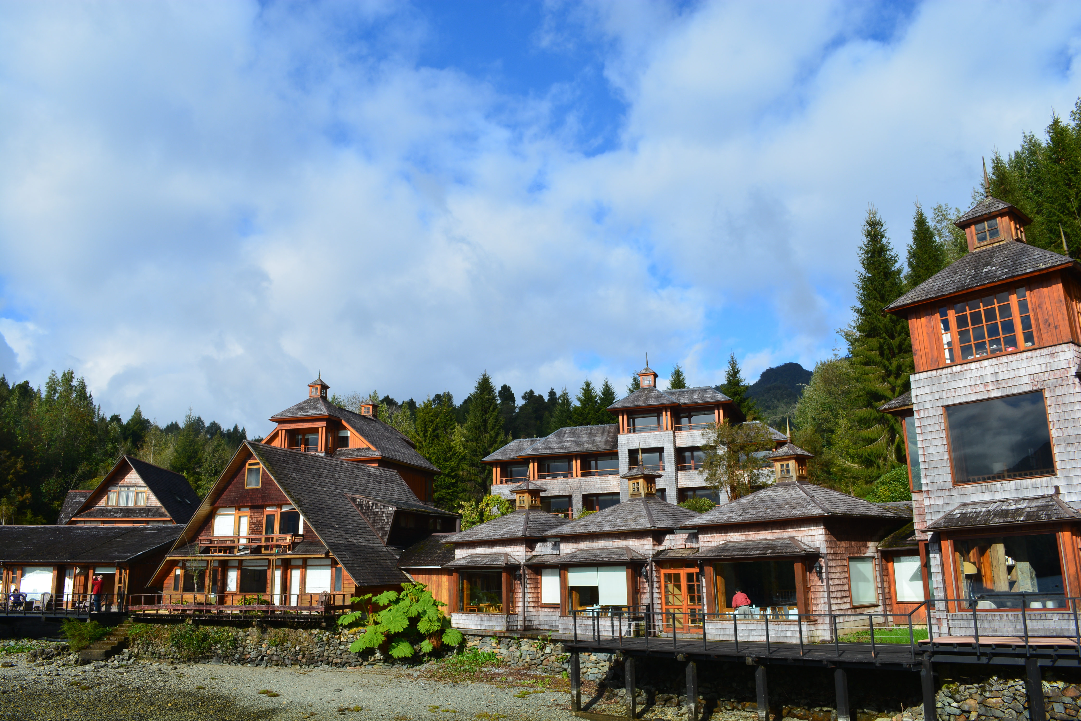 Lodge